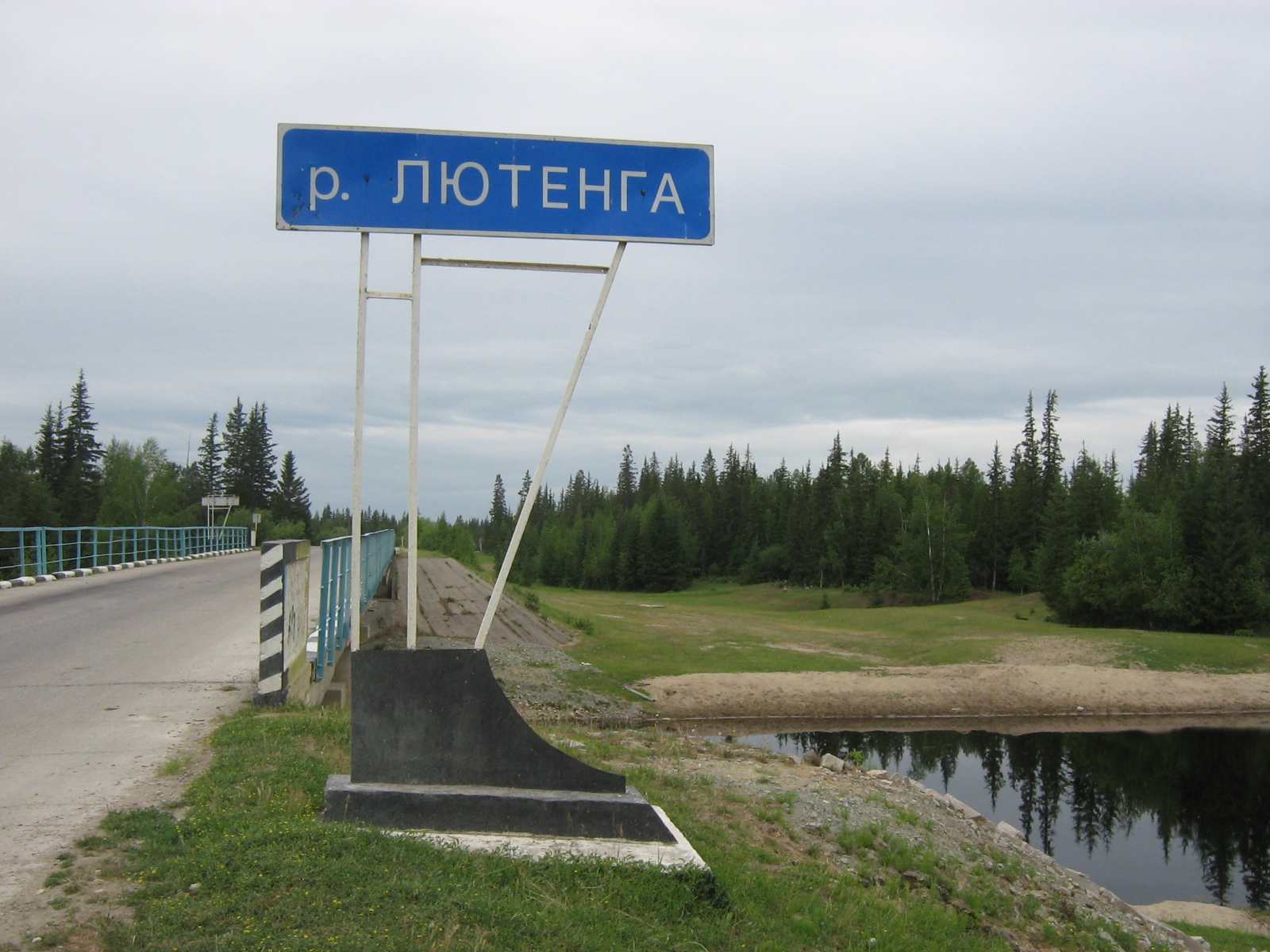 Мост на пересечении автодорогой "Лена" реки Лютенге